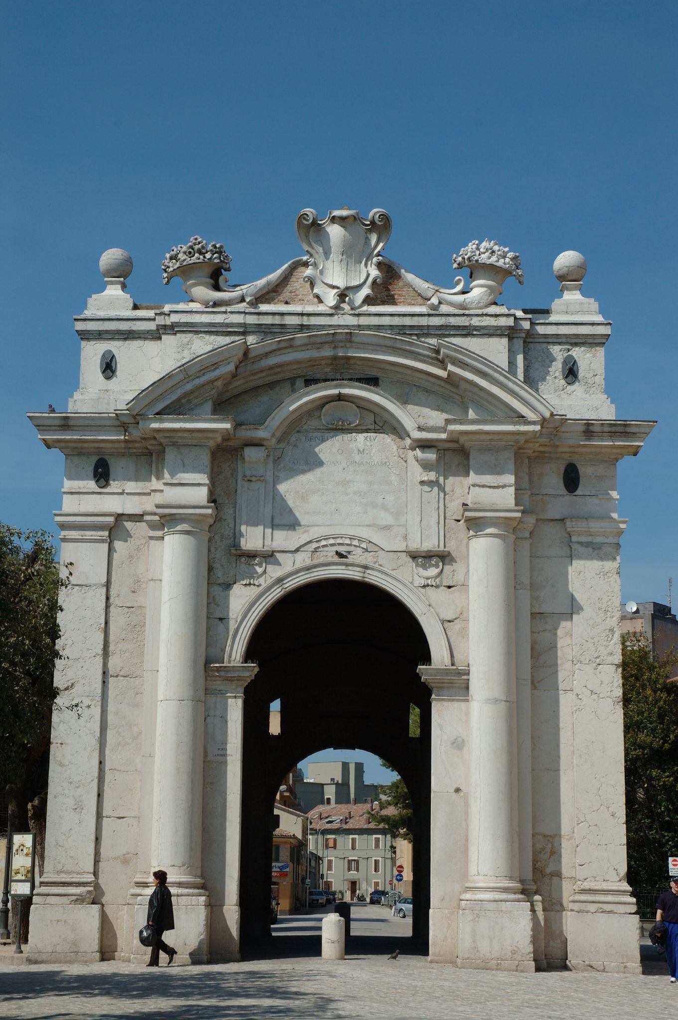 Senigallia: Porta Lambertina